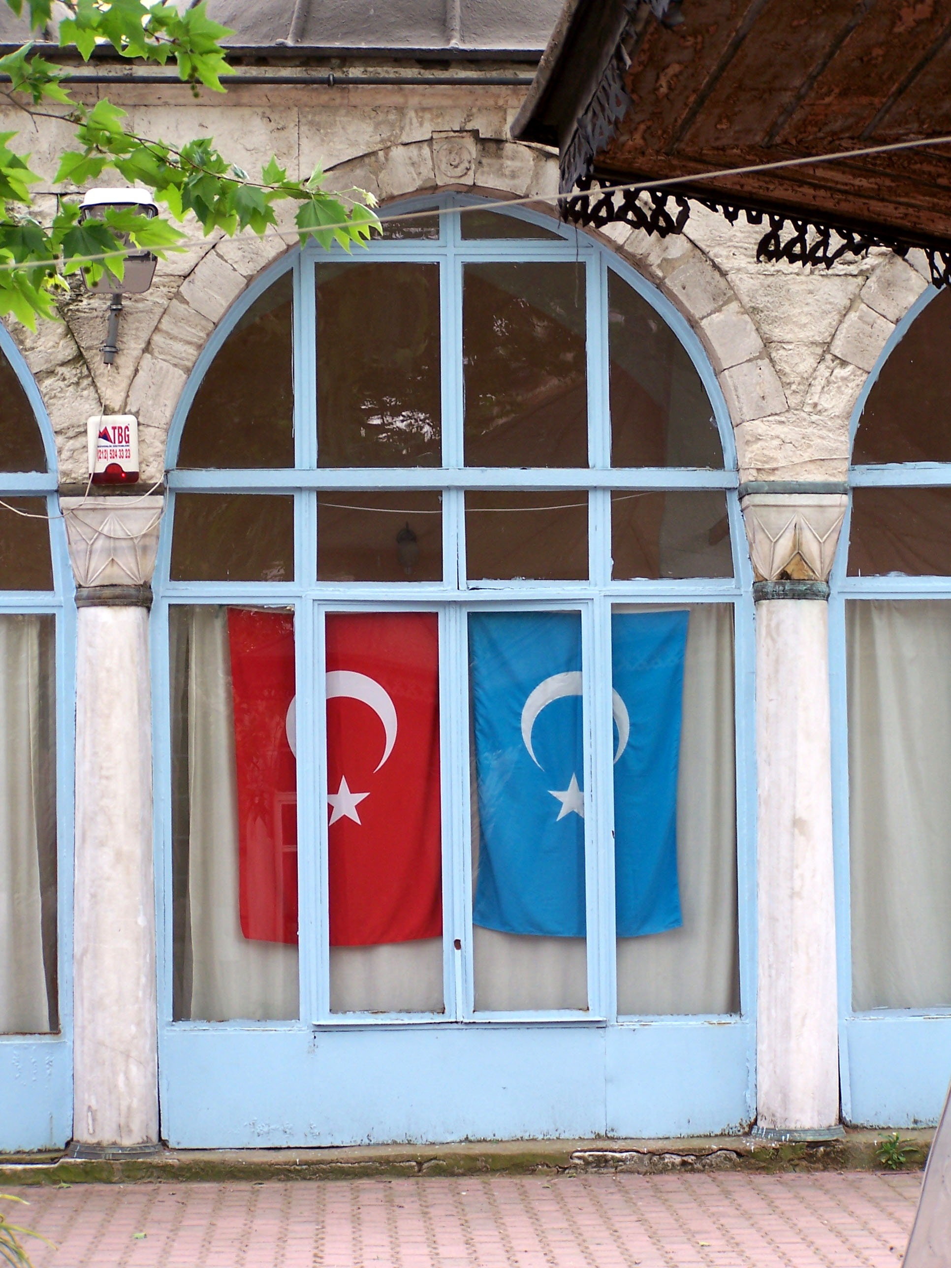 Flags of Turkey and Eastern Turkestan at Doğu Türkistan Vakfı-Kültür Merkezi (Eastern Turkistan Foundation-Cultural Center) in Fatih, İstanbul, Turkey